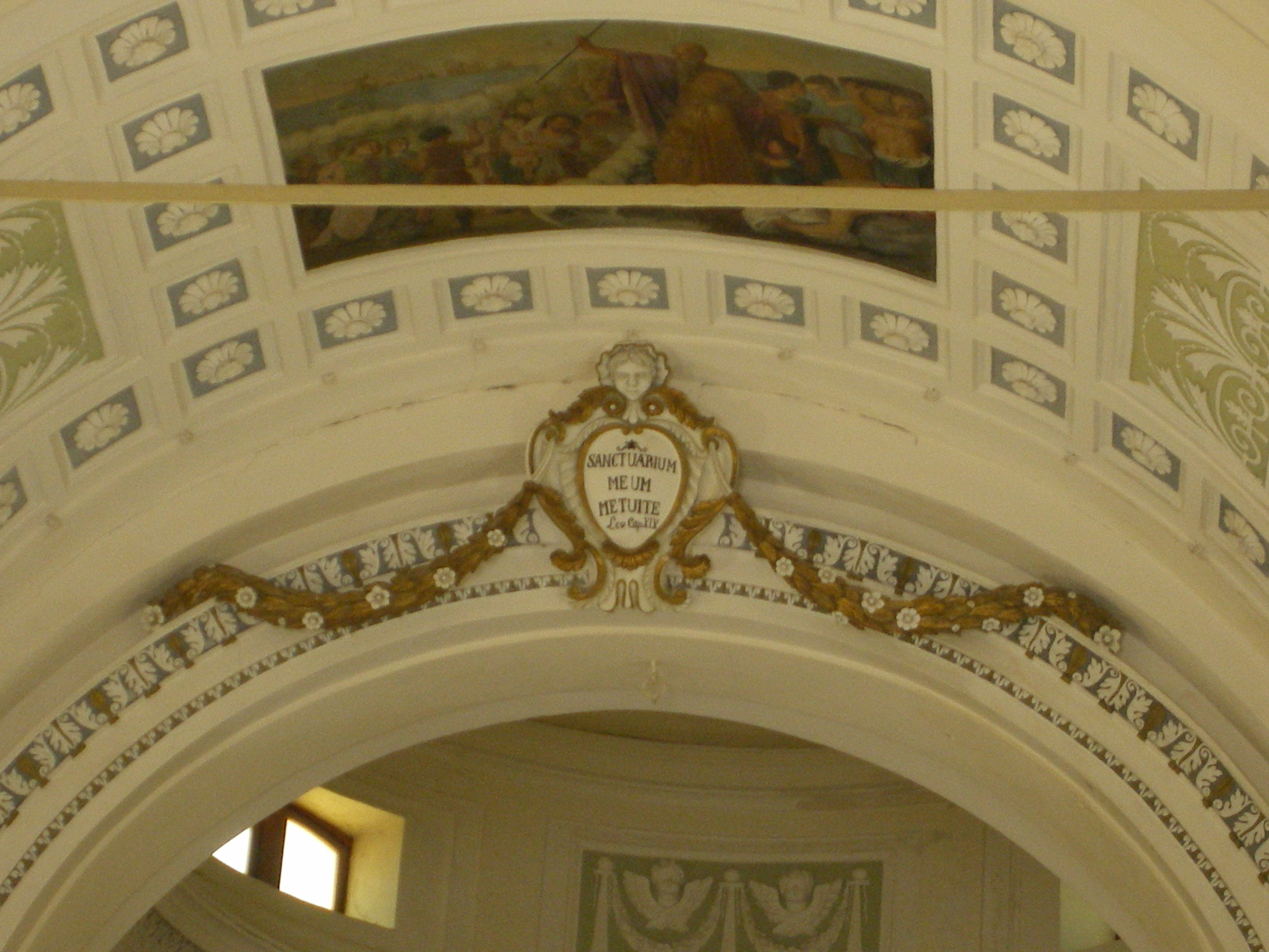 Chiesa madre di San Michele di ganzaria